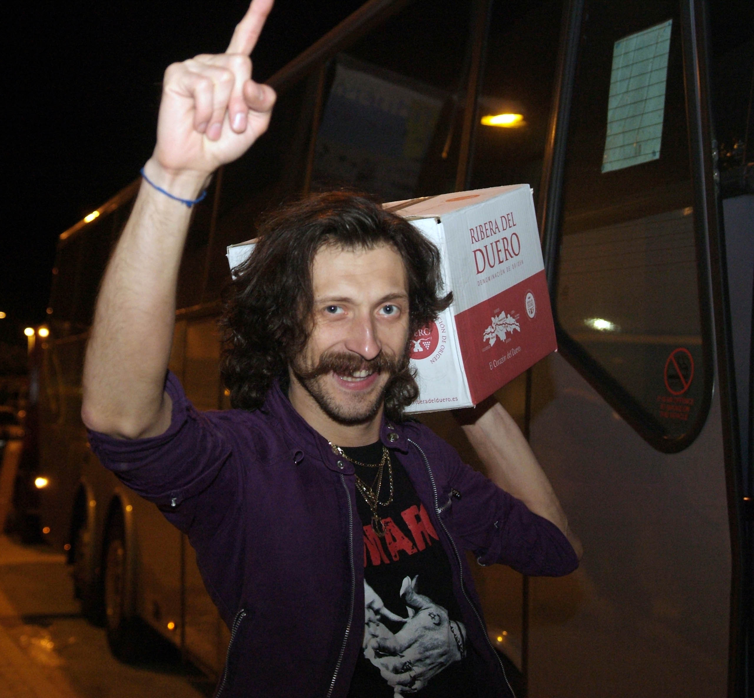 Eugene Hütz, el cantante de Gogol Bordello, justo antes de su actuación en el Festival Sonorama, en Aranda de Duero (Burgos), en España. Con una caja de vino de Ribera del Duero sobre su hombro. Foto de Jacobo Revenga.